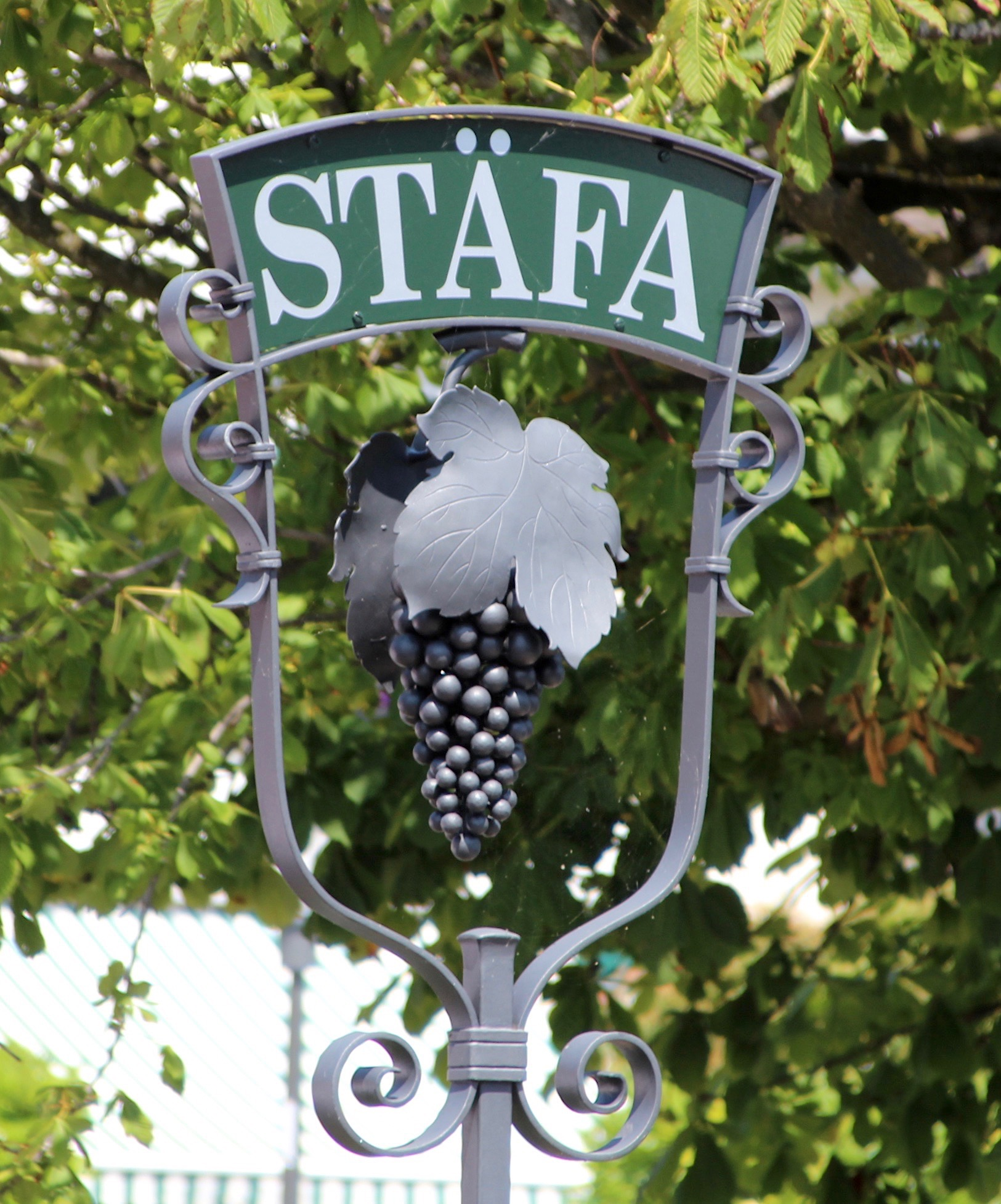 Stäfa